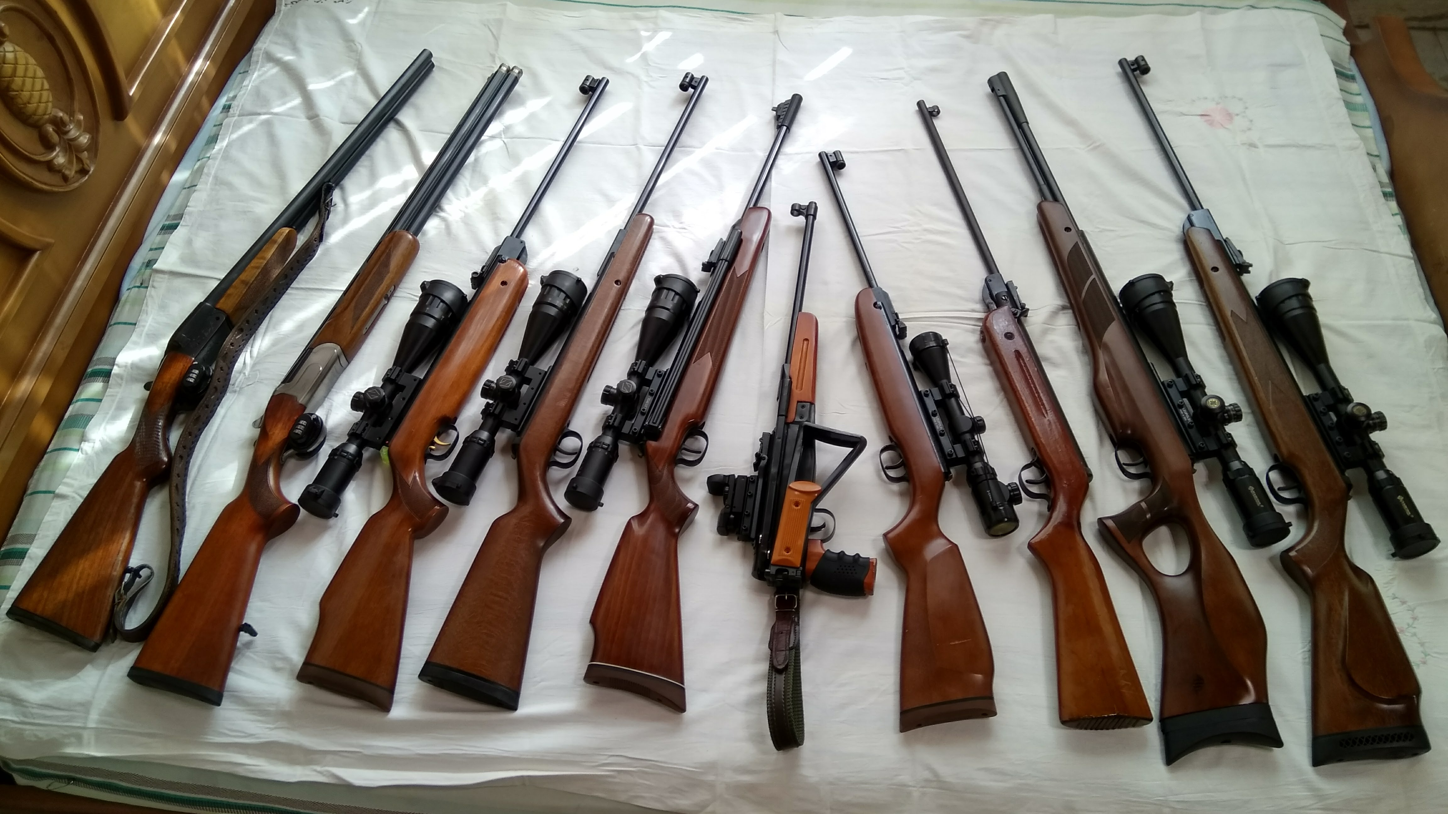 مجموعه ای از تفنگ های بادی و ساچمه زنی